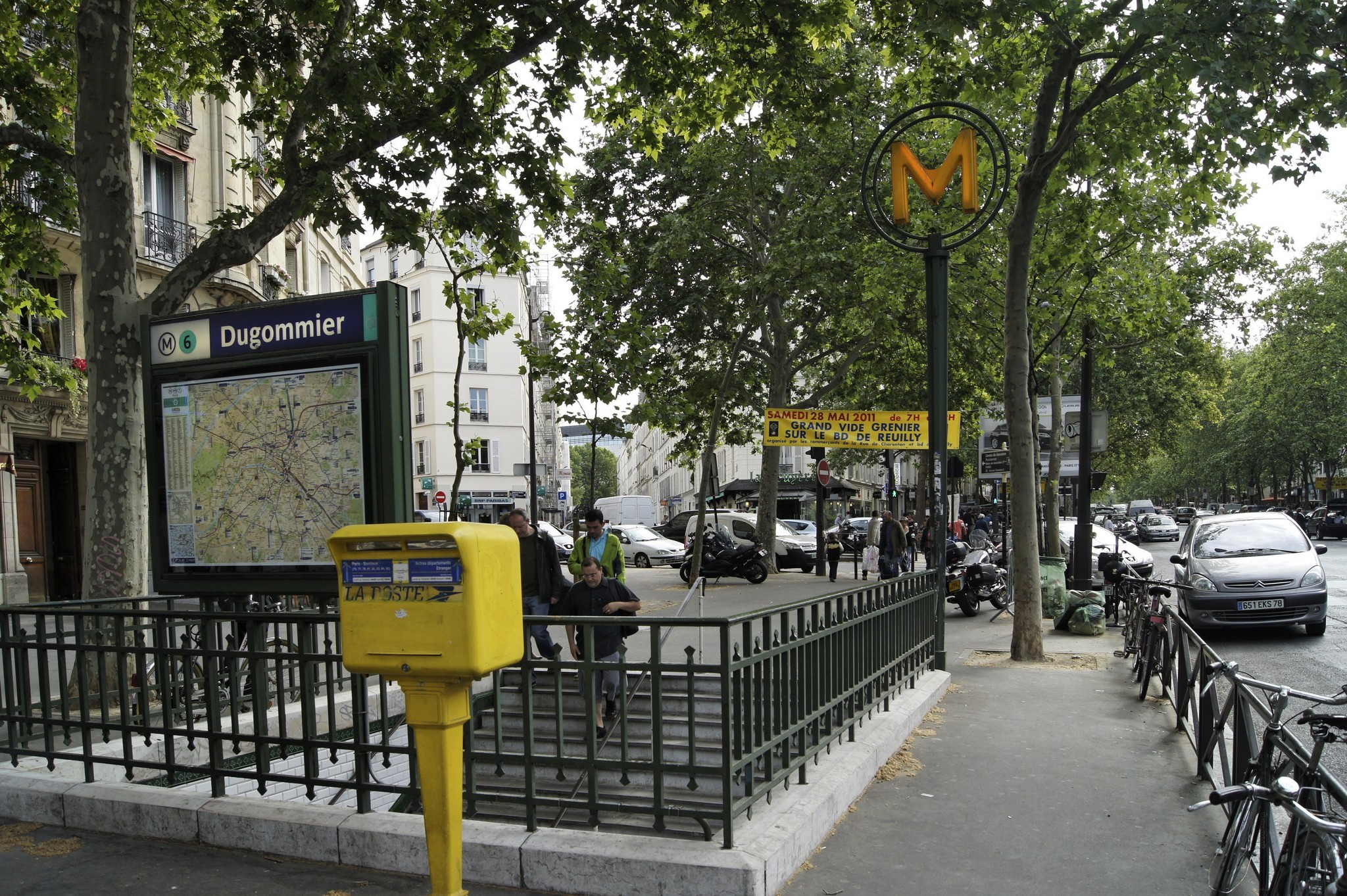 Dugommier (Paris Metro)